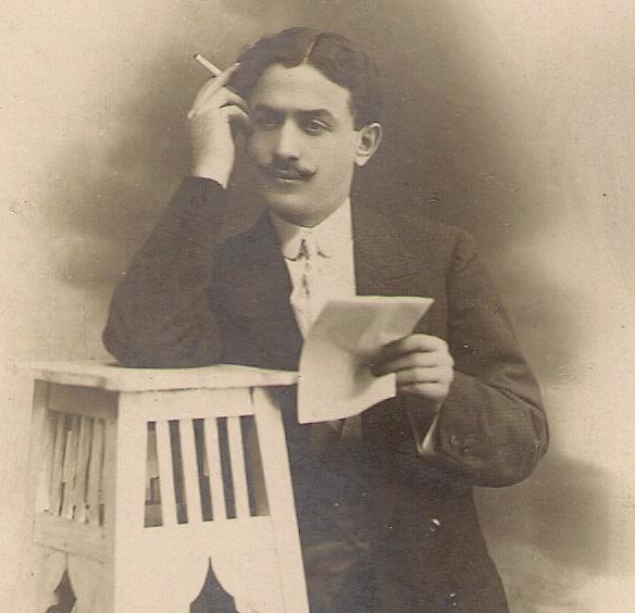 Anastase II Totoni-Frachery, rédacteur en chef du journal "Besa" à Constantinople Writers from Albania, Ecrivain albanais, Frasheri